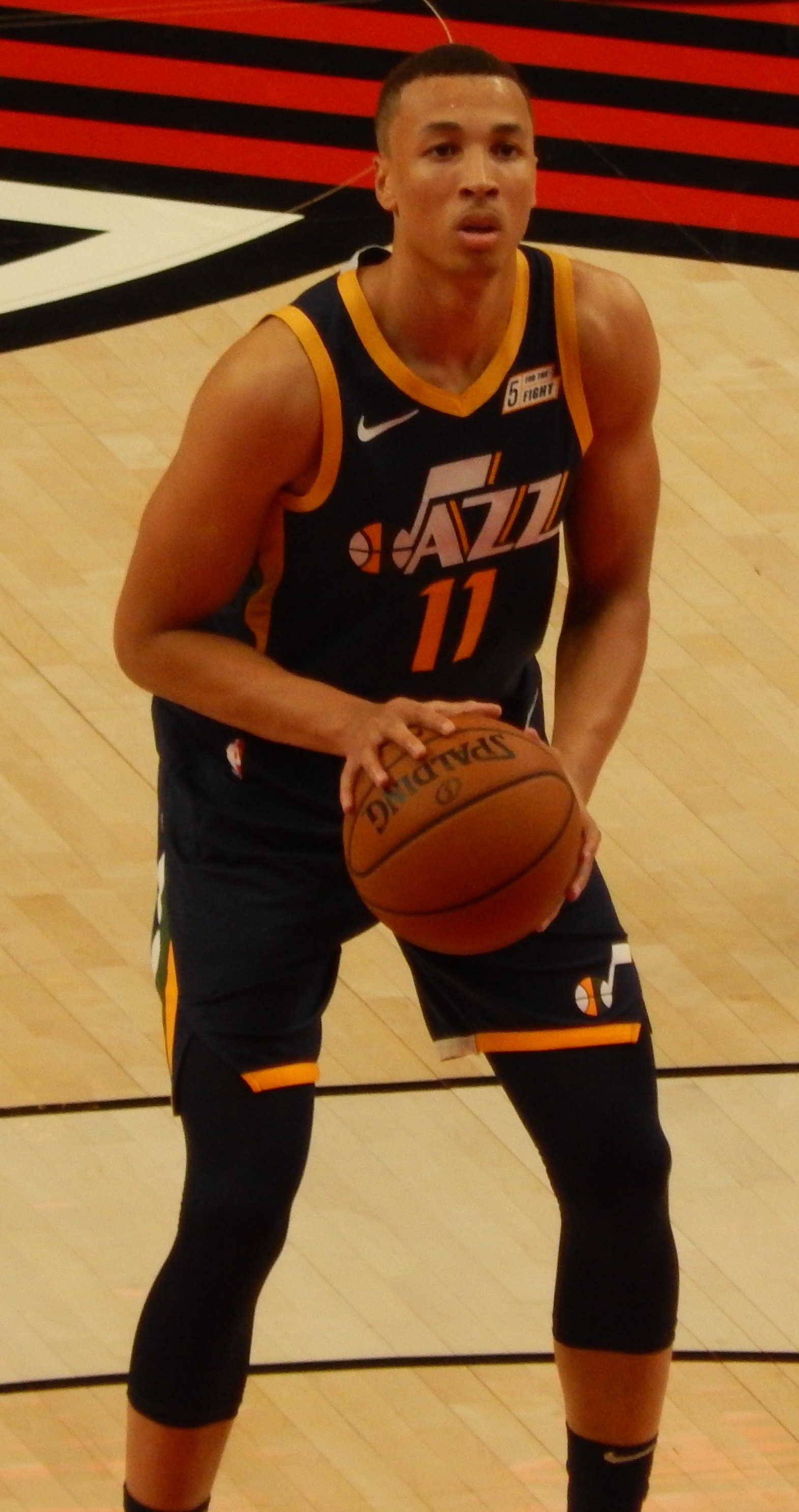 Dante Exum #11 of the Utah Jazz against the Portland Trail Blazers on October 7, 2018 at Moda Center in Portland, Oregon.